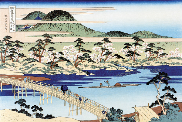 山城あらし山吐月橋(やましろあらしやまとげつきょう)